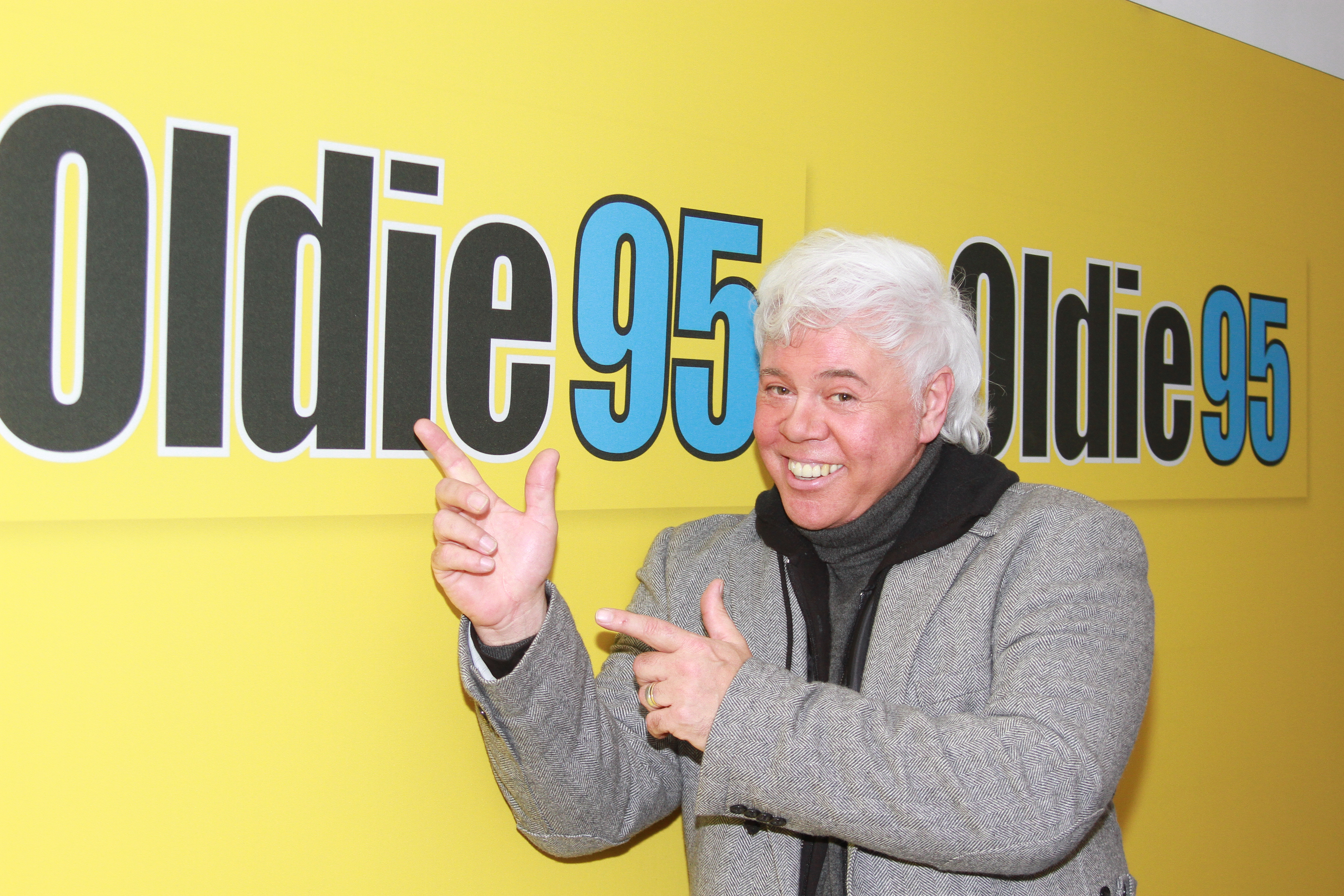 Taco Ockerse (* 21. Juli 1955 in Jakarta) ist ein niederländischer Popsänger, der durch seine Coverversion des Irving Berlin-Hits Puttin’ on the Ritz bekannt geworden ist.